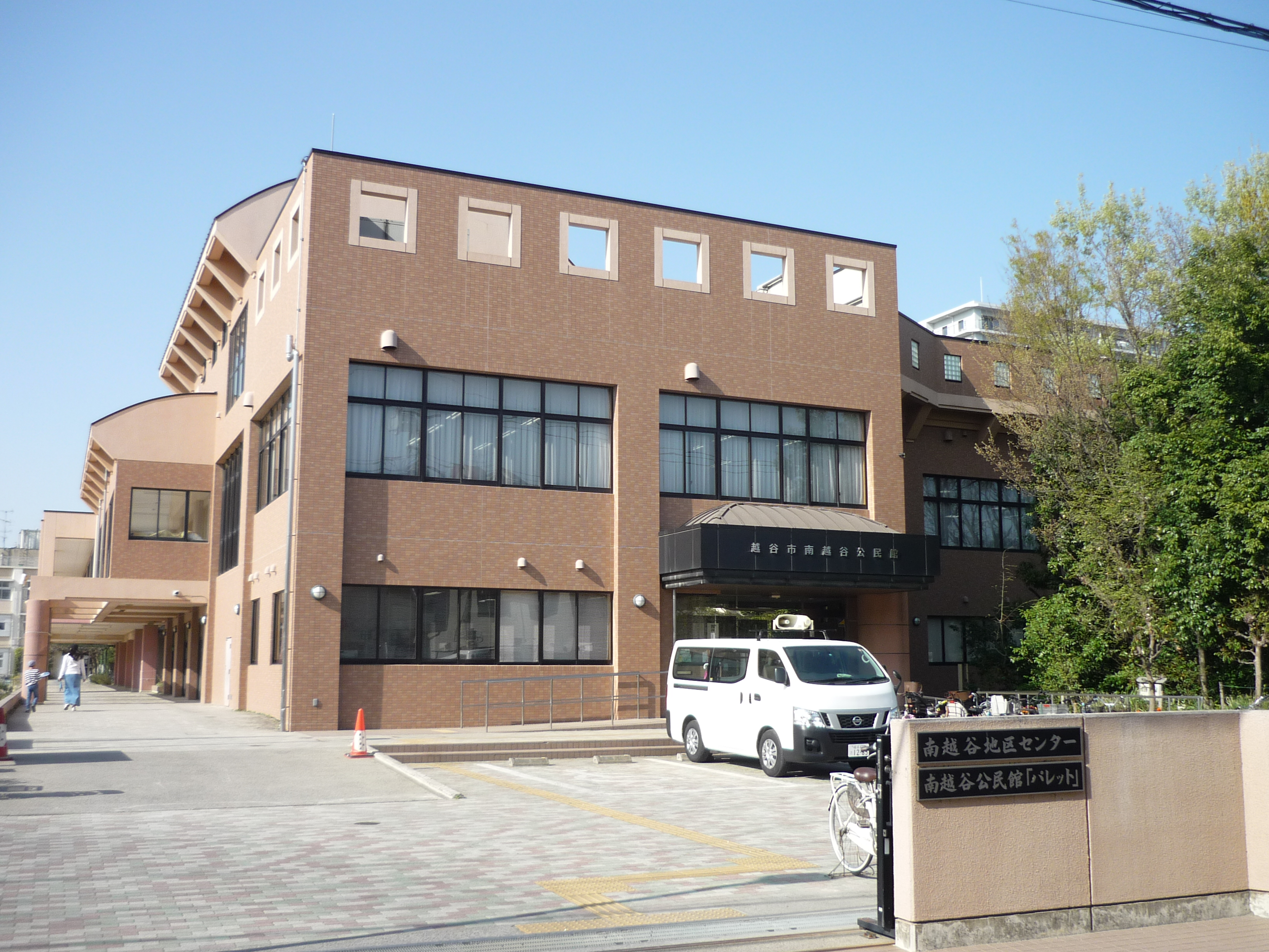 越谷市南越谷公民館 パレット